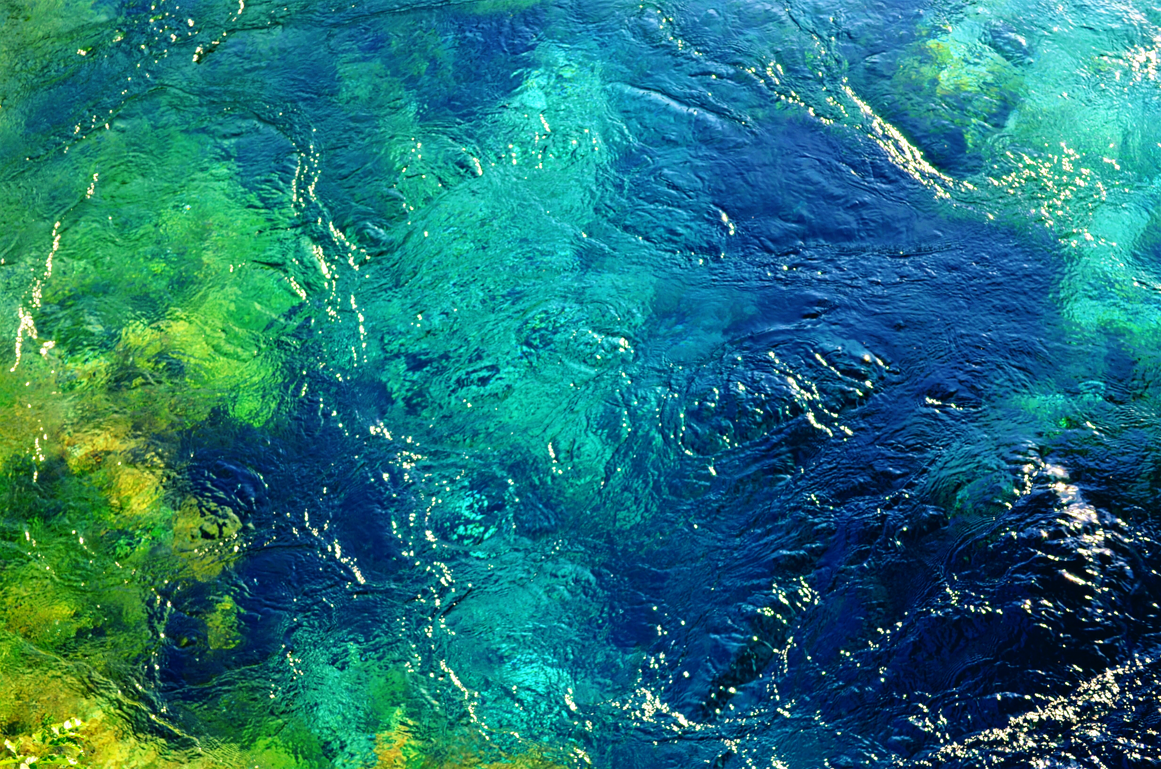 Syri i Kalter, Delvine